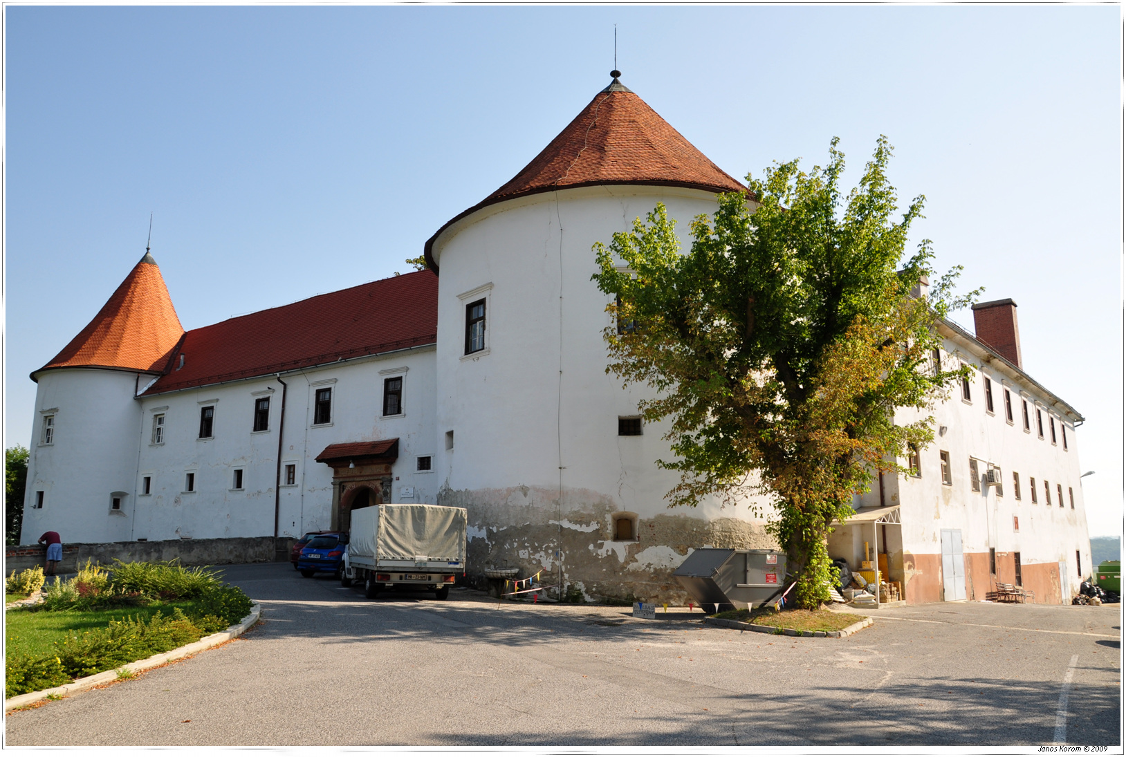 Hrastovec (2)